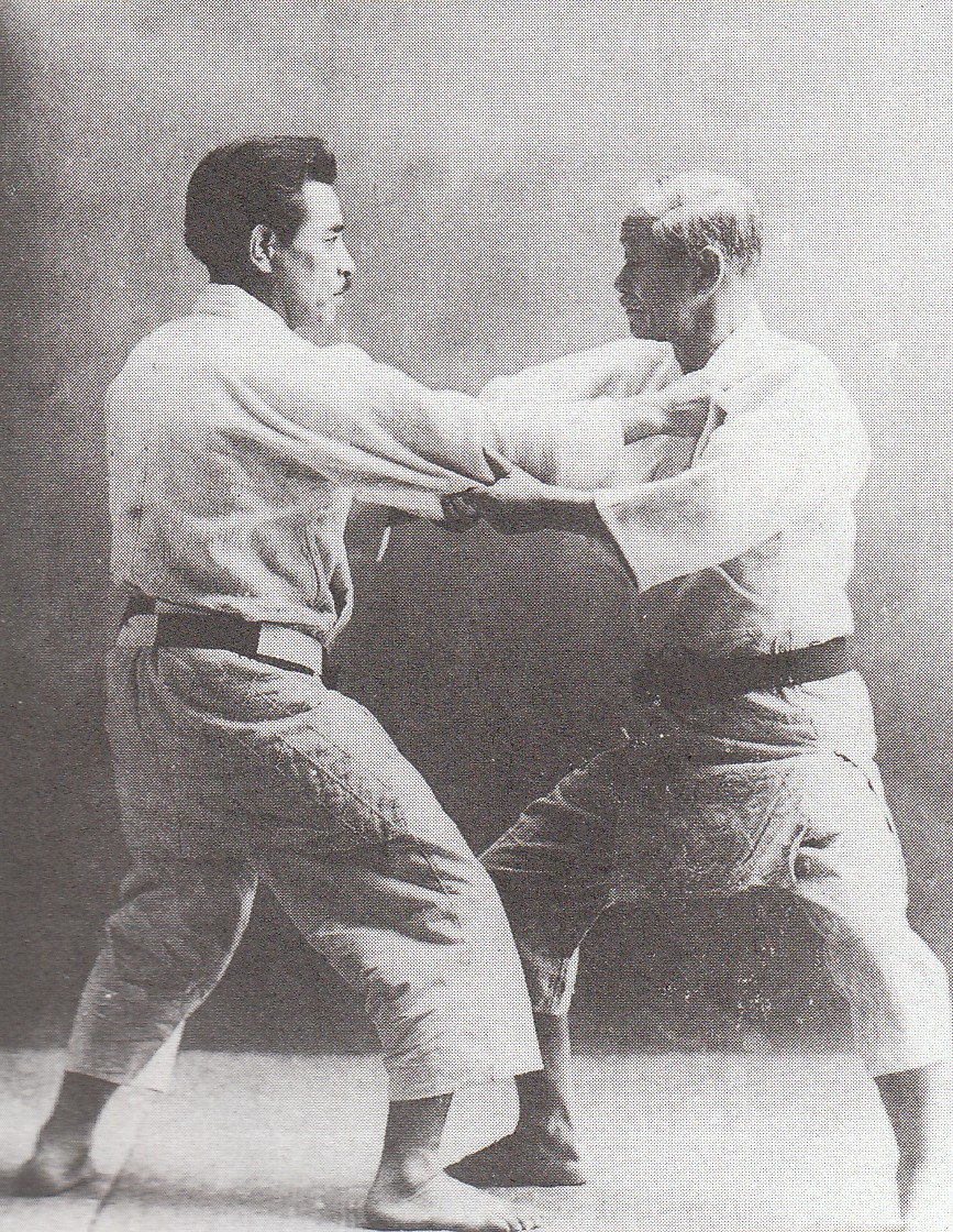 Japanese judoka ,Jigoro Kano(right) and Kyuzo Mifune(left)